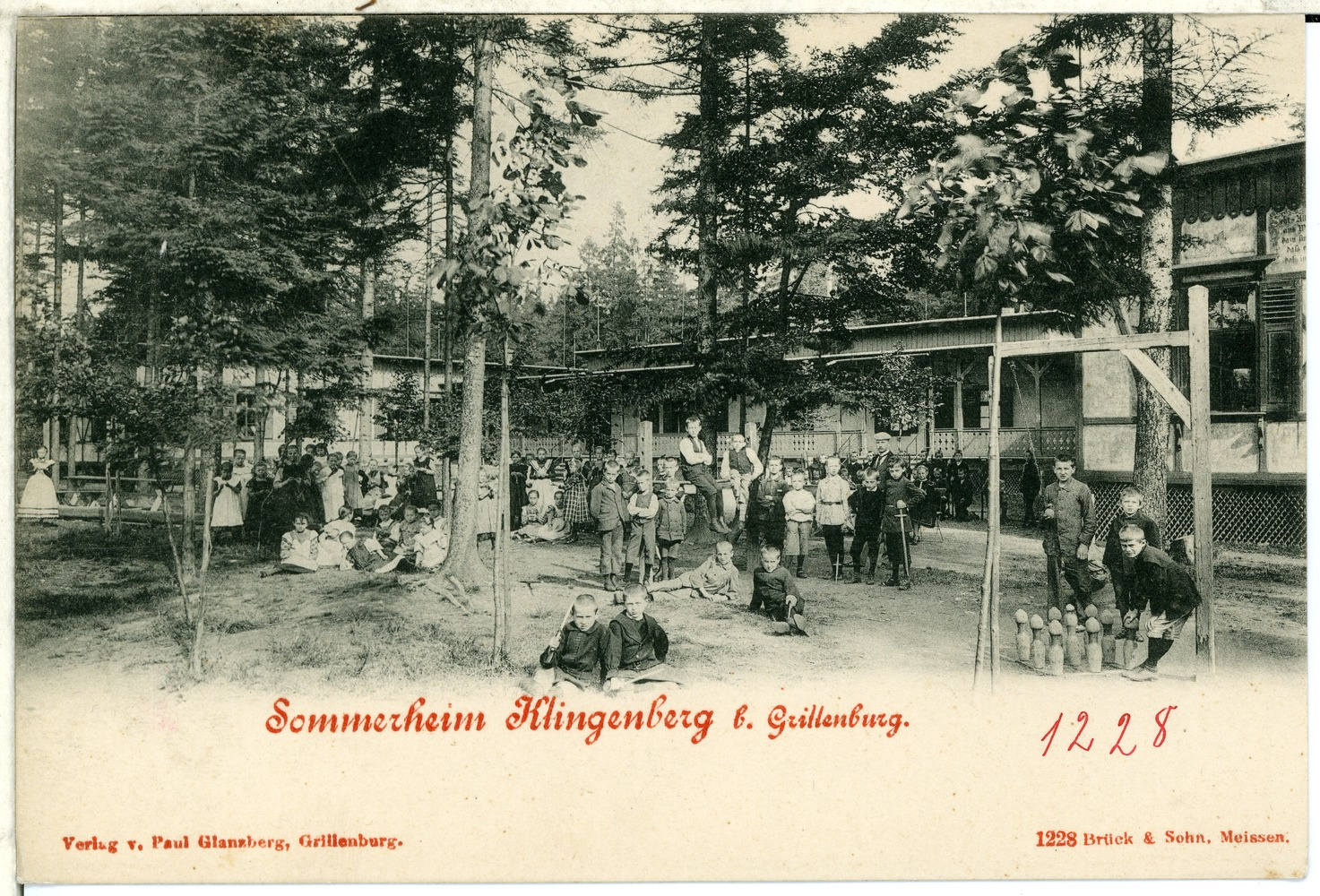 Klingenberg; Sommerheim This postcard is from publisher Brück & Sohn in Meißen ( postcard has a unique number 01228 and is available in a higher resolution at the publisher. This images was uploaded in a cooperation project between Wikipedians and the publisher.